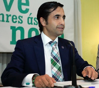 José Manuel Rey Varela en outubro de 2016